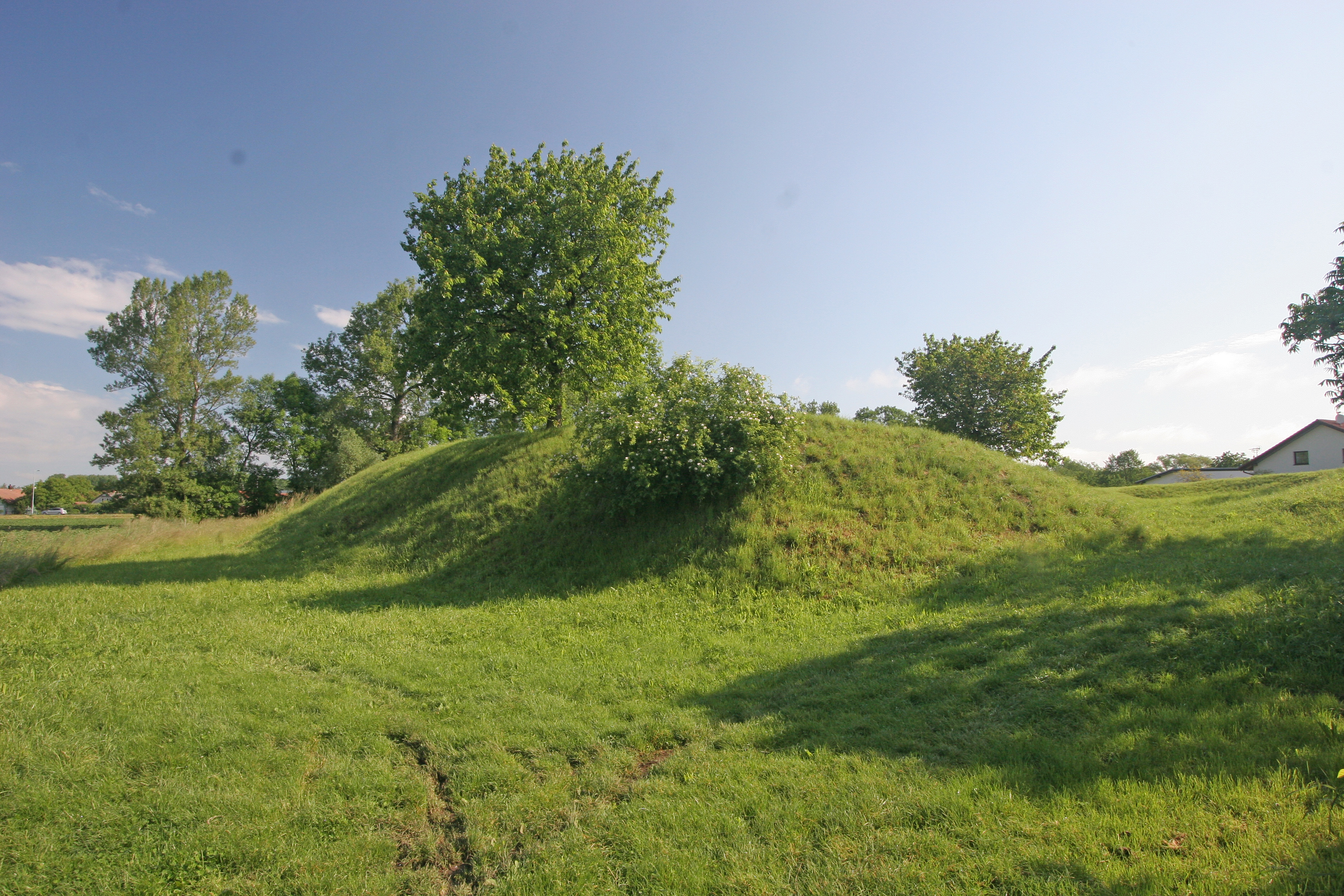 Tvrz - tvrziště, archeologické stopy (Staré Čívice), Z okraj obce, při č. p. 8, Staré Čívice